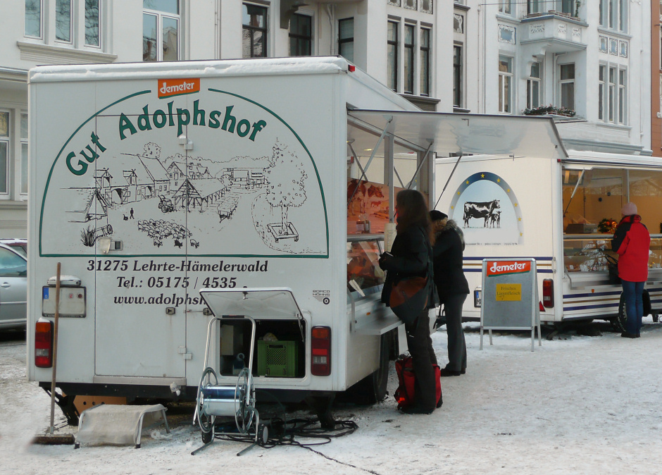 Marktstand des Adolphshofs